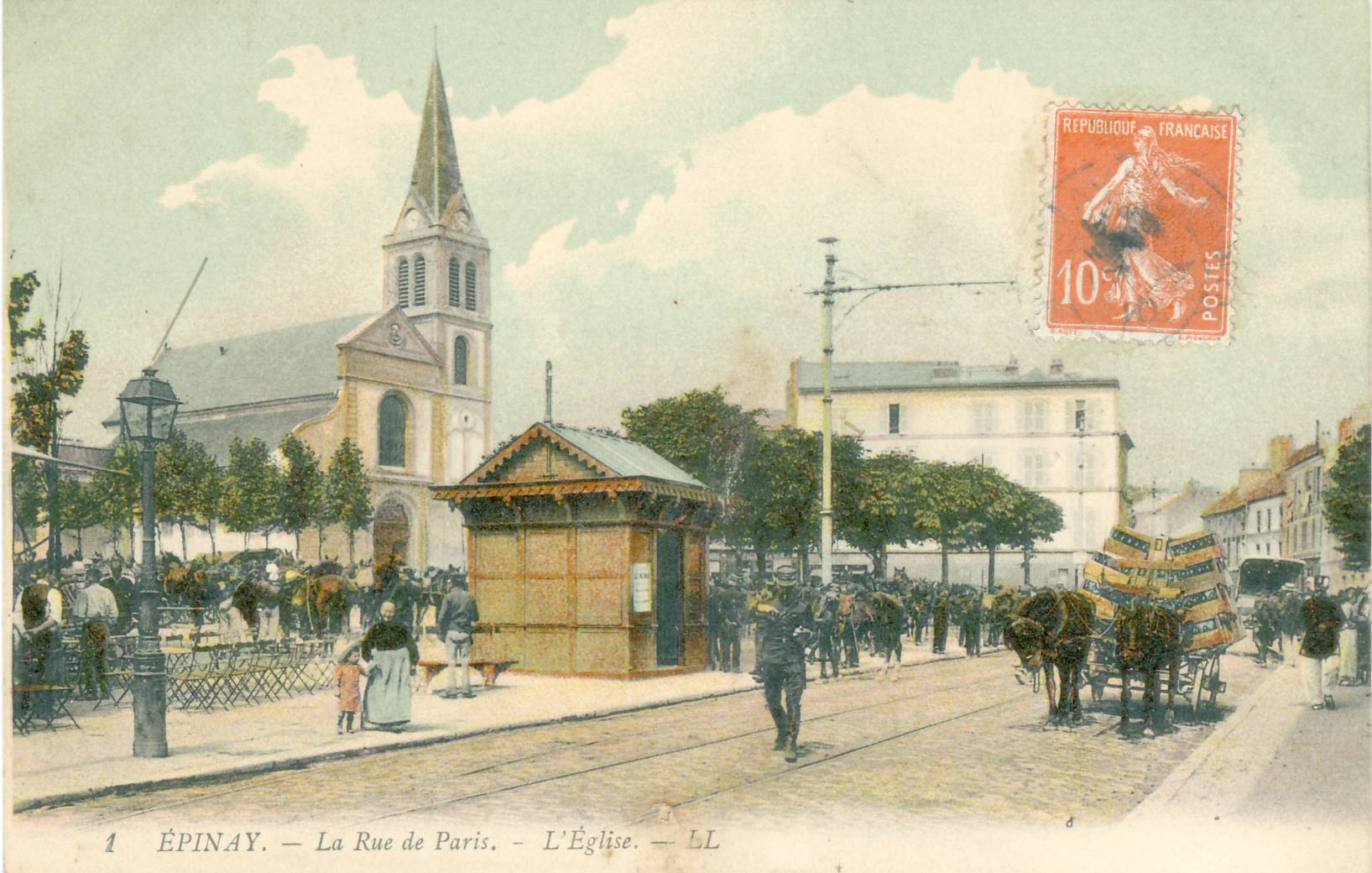 Carte postale ancienne éditée par LL N°1Épinay-sur-Seine : La Rue de Paris - L'Eglise